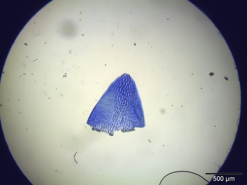 Trügerisches Torfmoos (Sphagnum fallax), Stammblatt, Vergrößerung: 40x